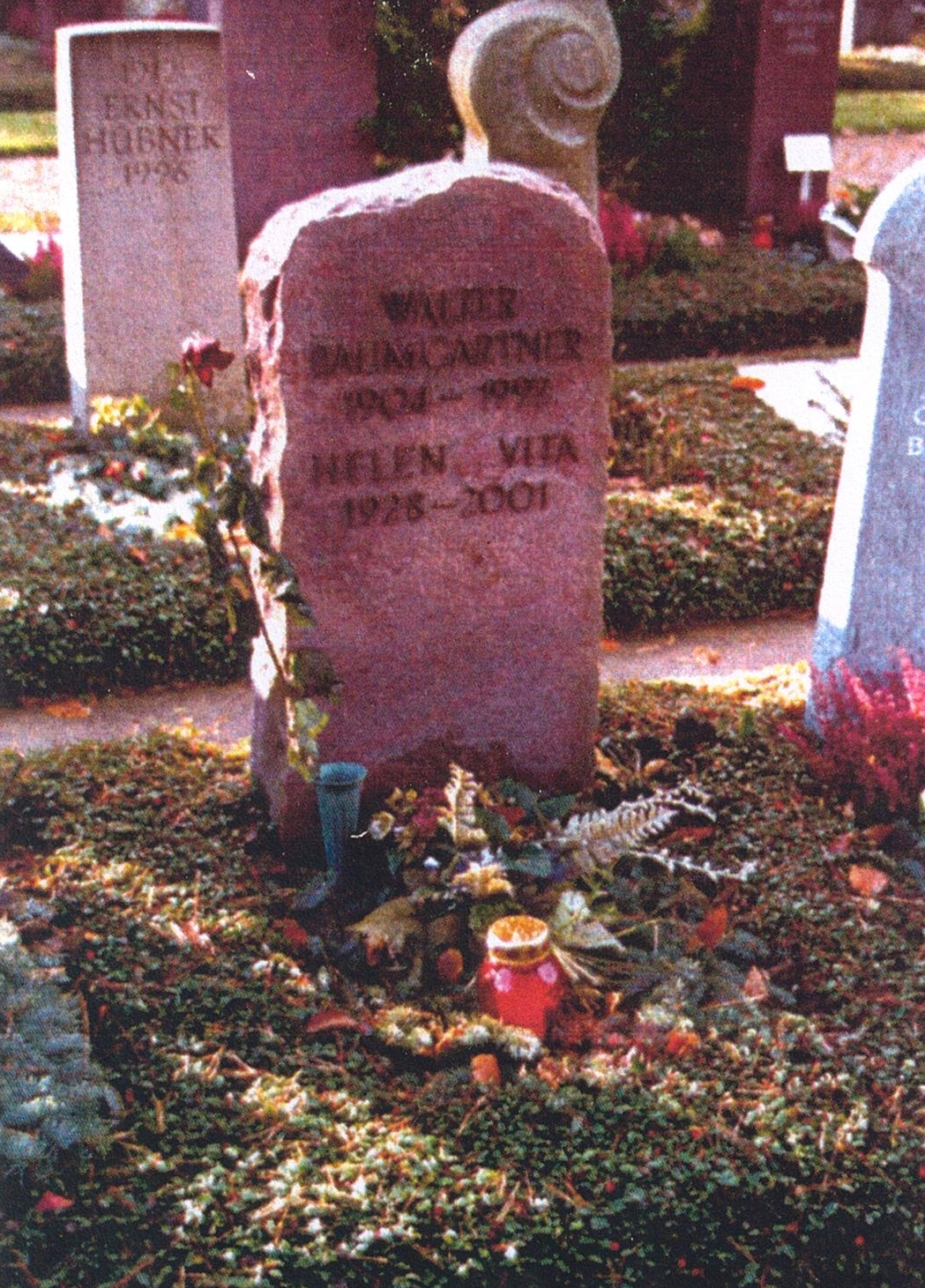 Friedhof Zollikerberg-Helen Vita